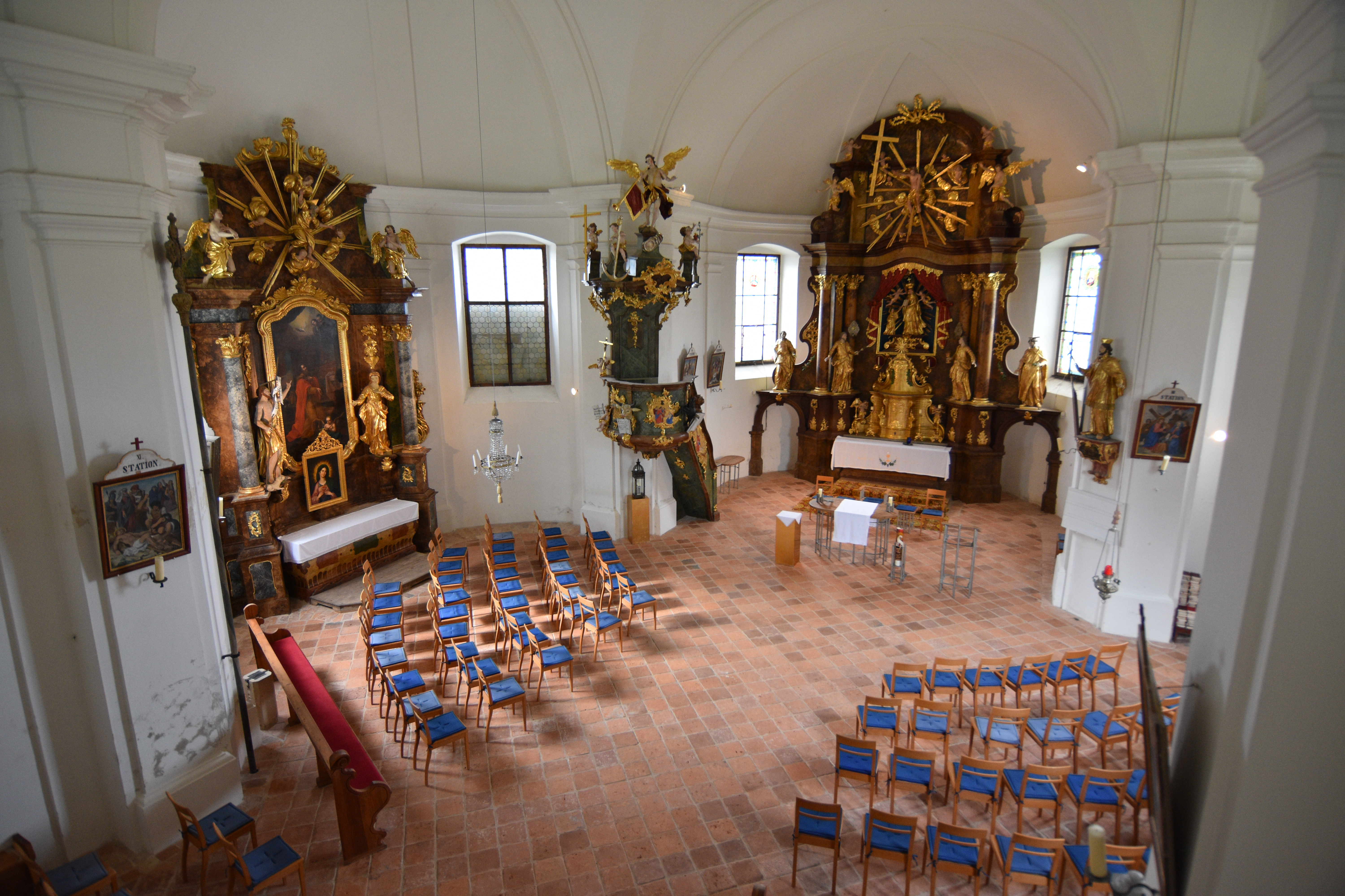 Kath. Filialkirche hl. Anna (Jobst) - Interior, Bad Blumau